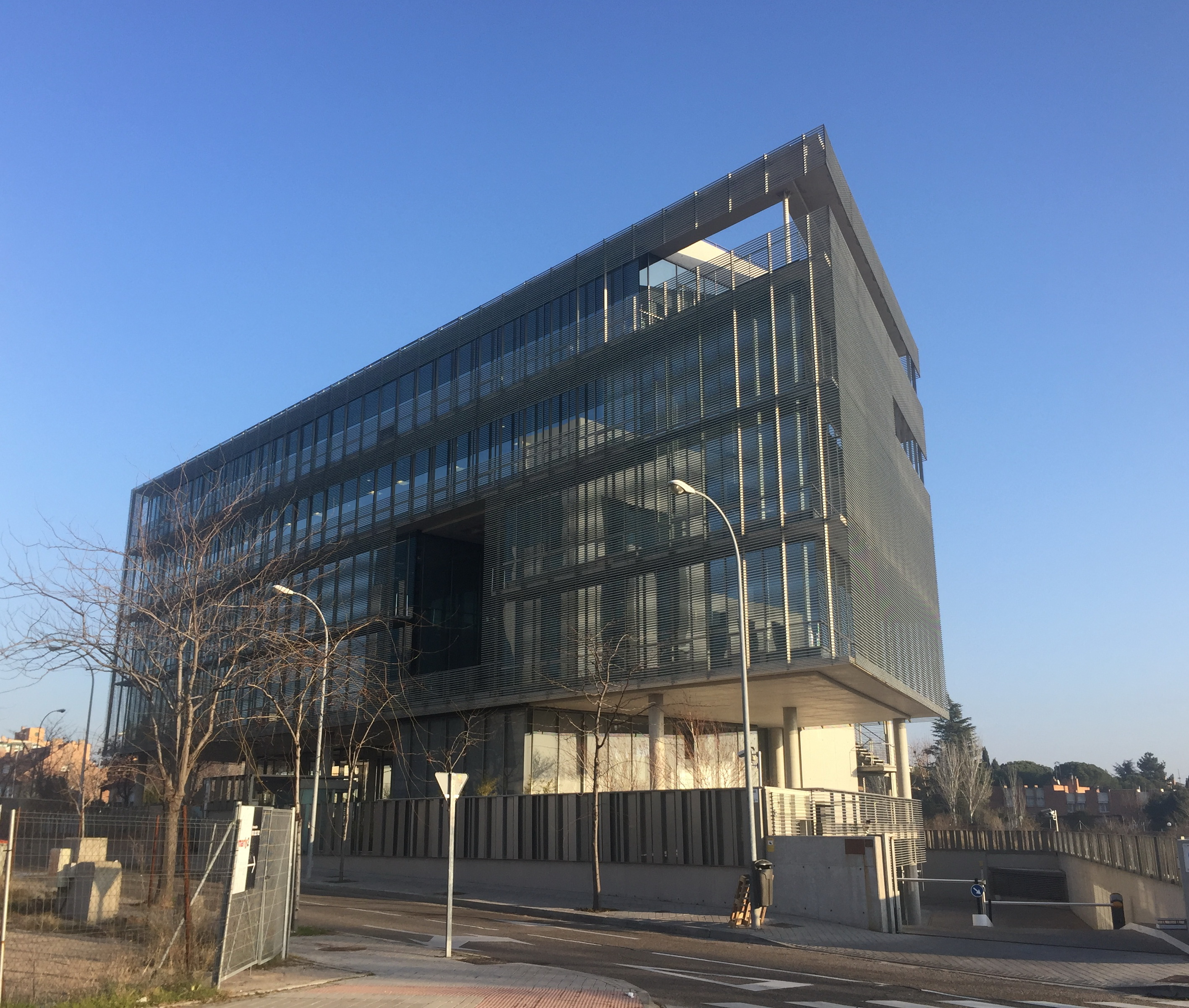 Sede del Estudio Lamela en Madrid